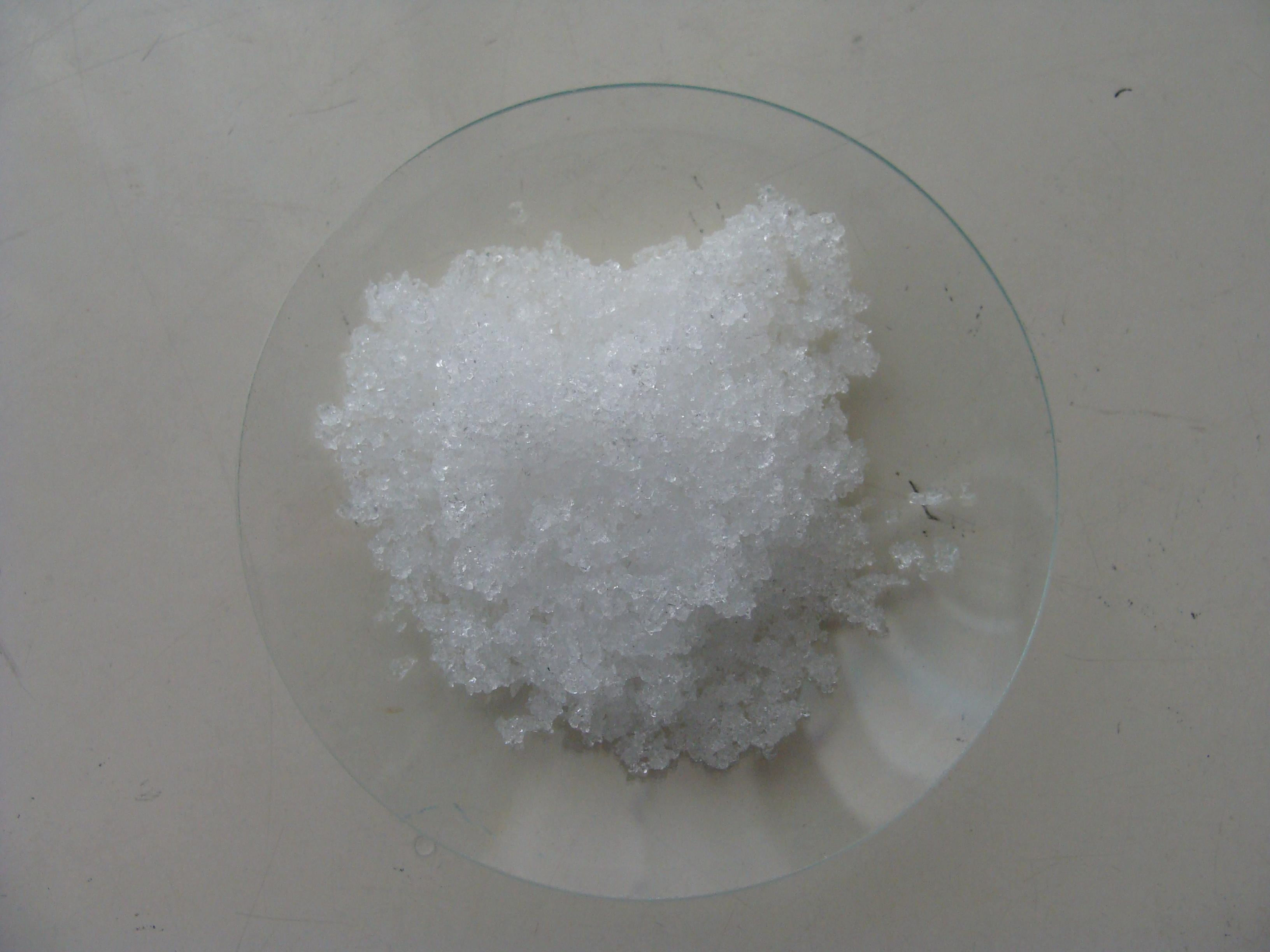 ammonium nitrate 中文（中国大陆）: 硝酸铵